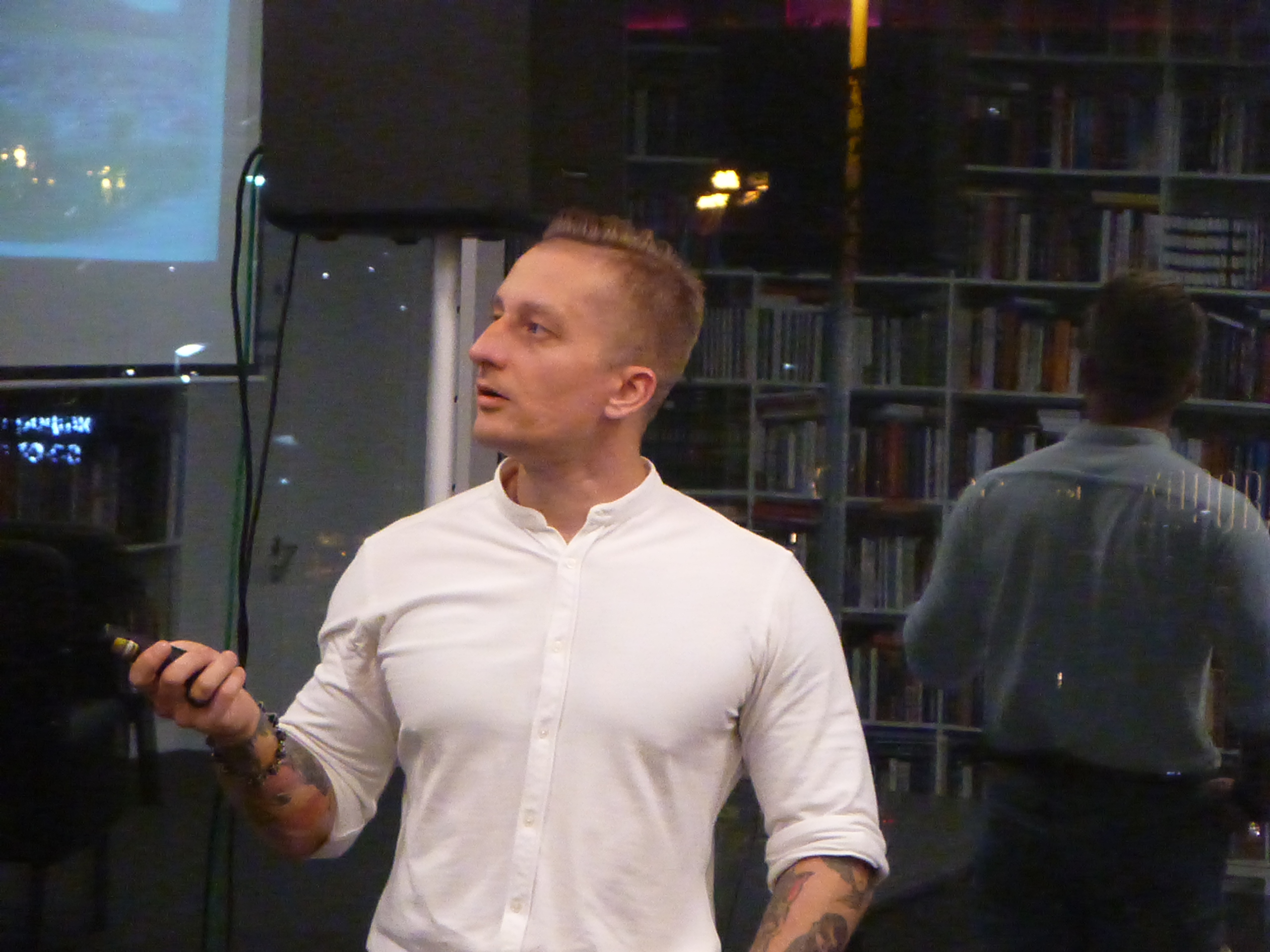 Сергей Викторович Мохов читает лекцию в Пиотровском, Ельцин-центр, 14 сентября 2019 года